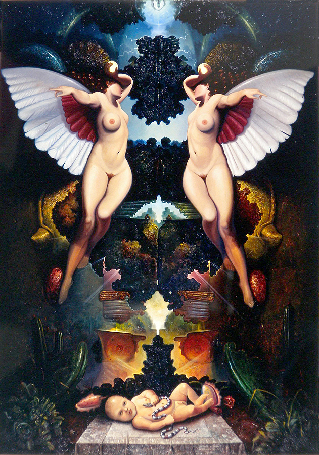 pintura venusexatom pajaro